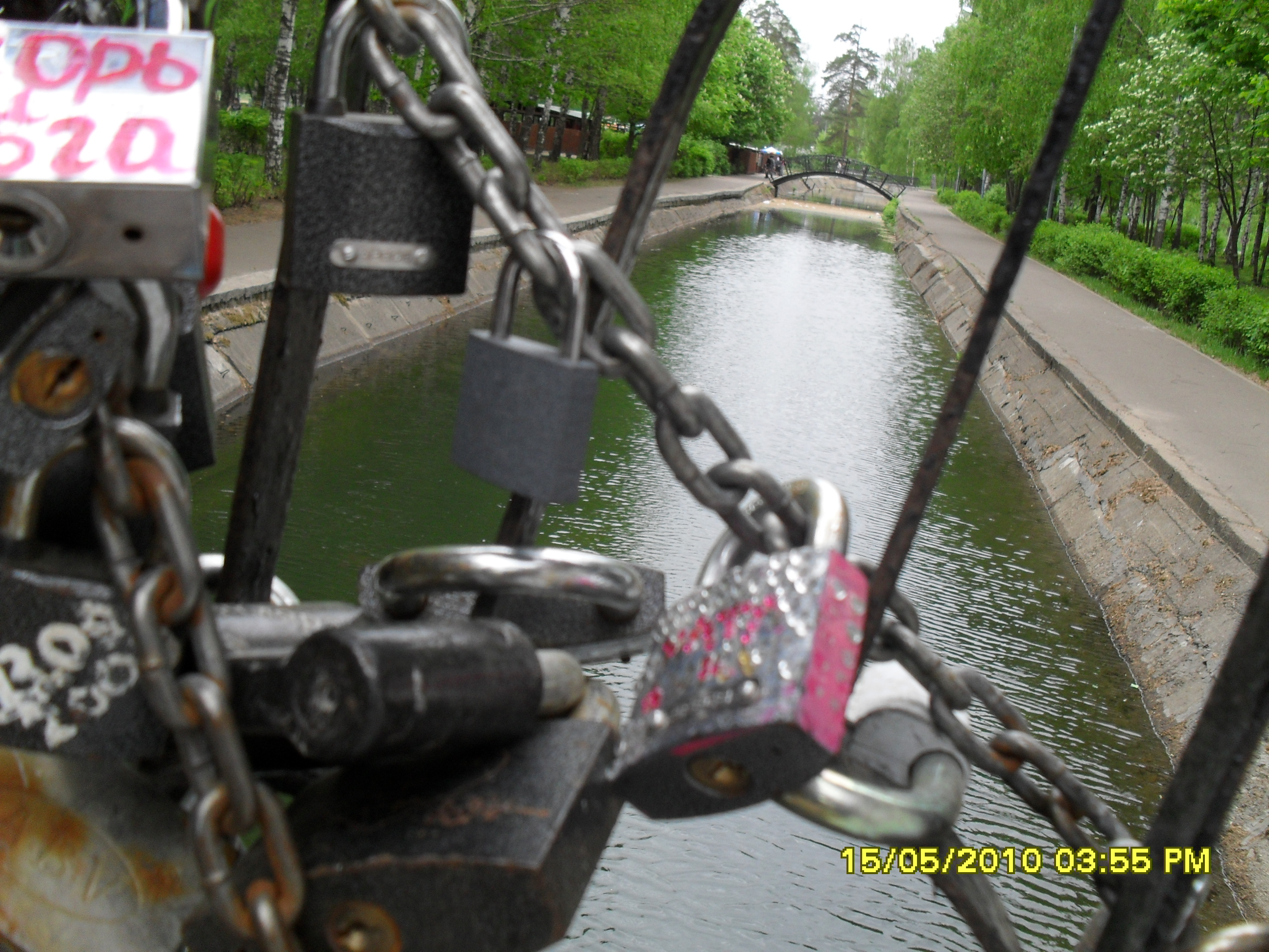 замки, установленные на мостах в парке Урицкого.